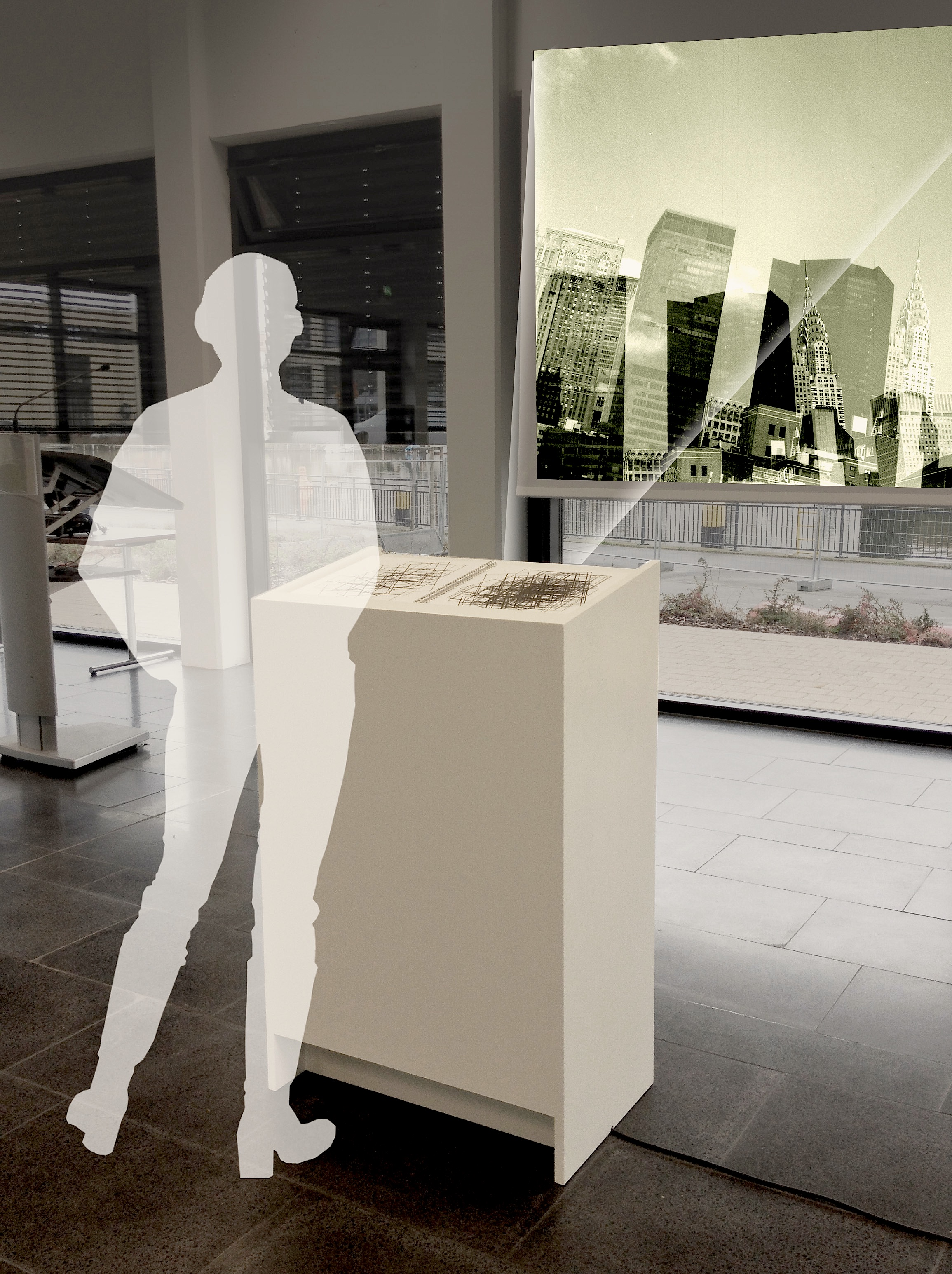 "Urban Framing" von Sandra Becker ist ein analoges und digitales Buch mit RFID.